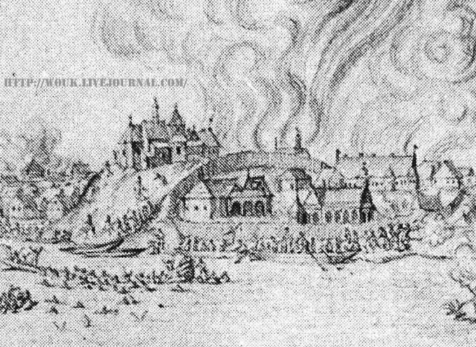 Беларуская (тарашкевіца): Бабруйск (Babrujsk), замак